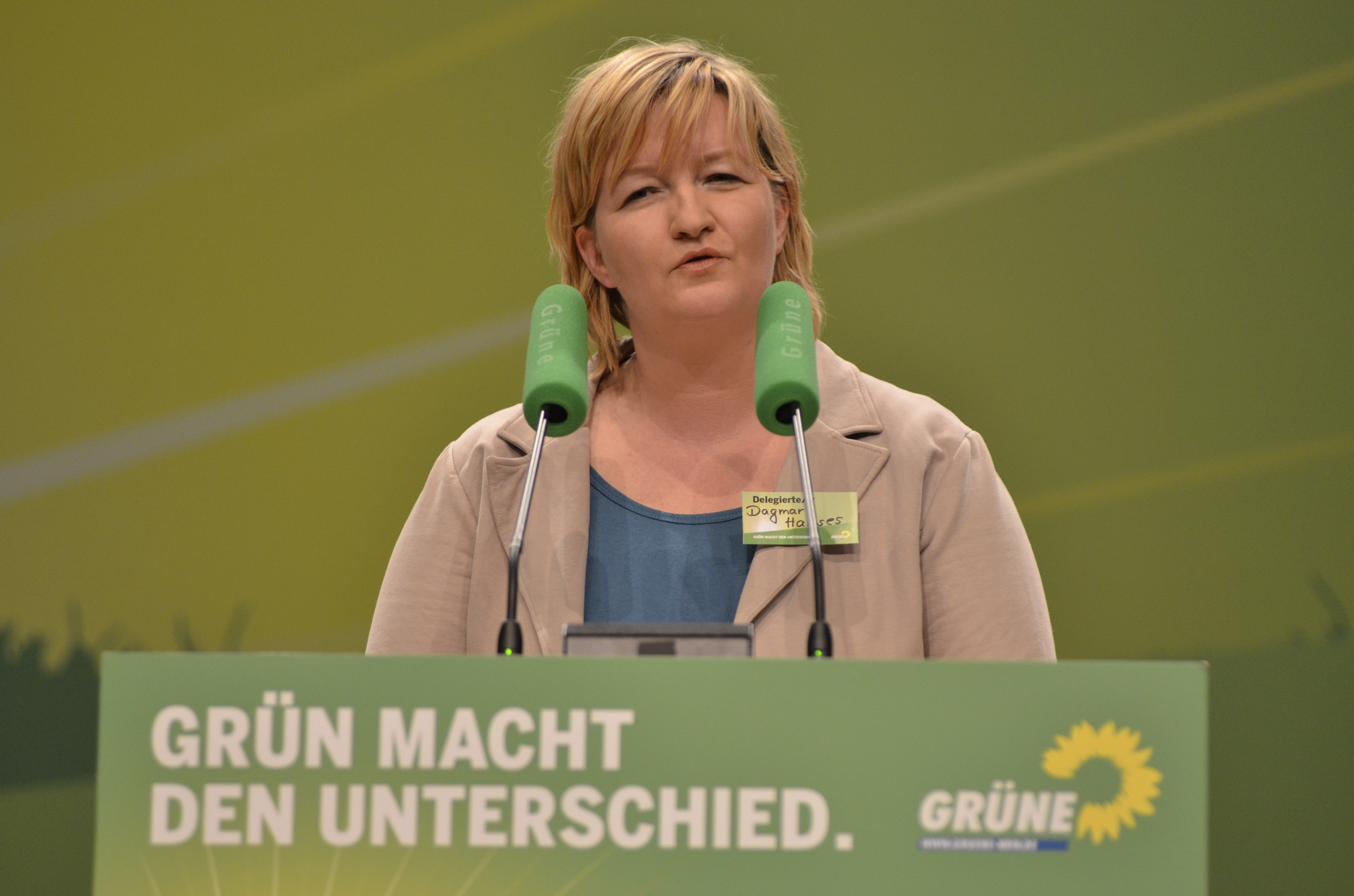 Dagmar Hanses